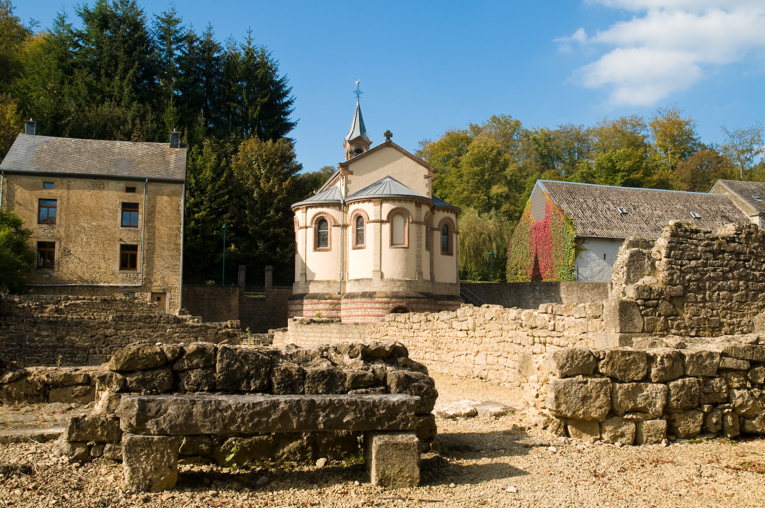 Südseite der Abtei von Clairfontaine